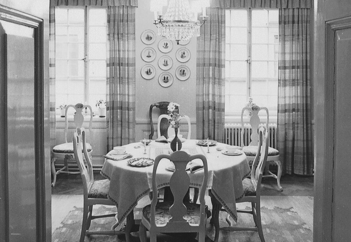 Bostadsrum, Hornsgatan 38, vån. 2 tr.